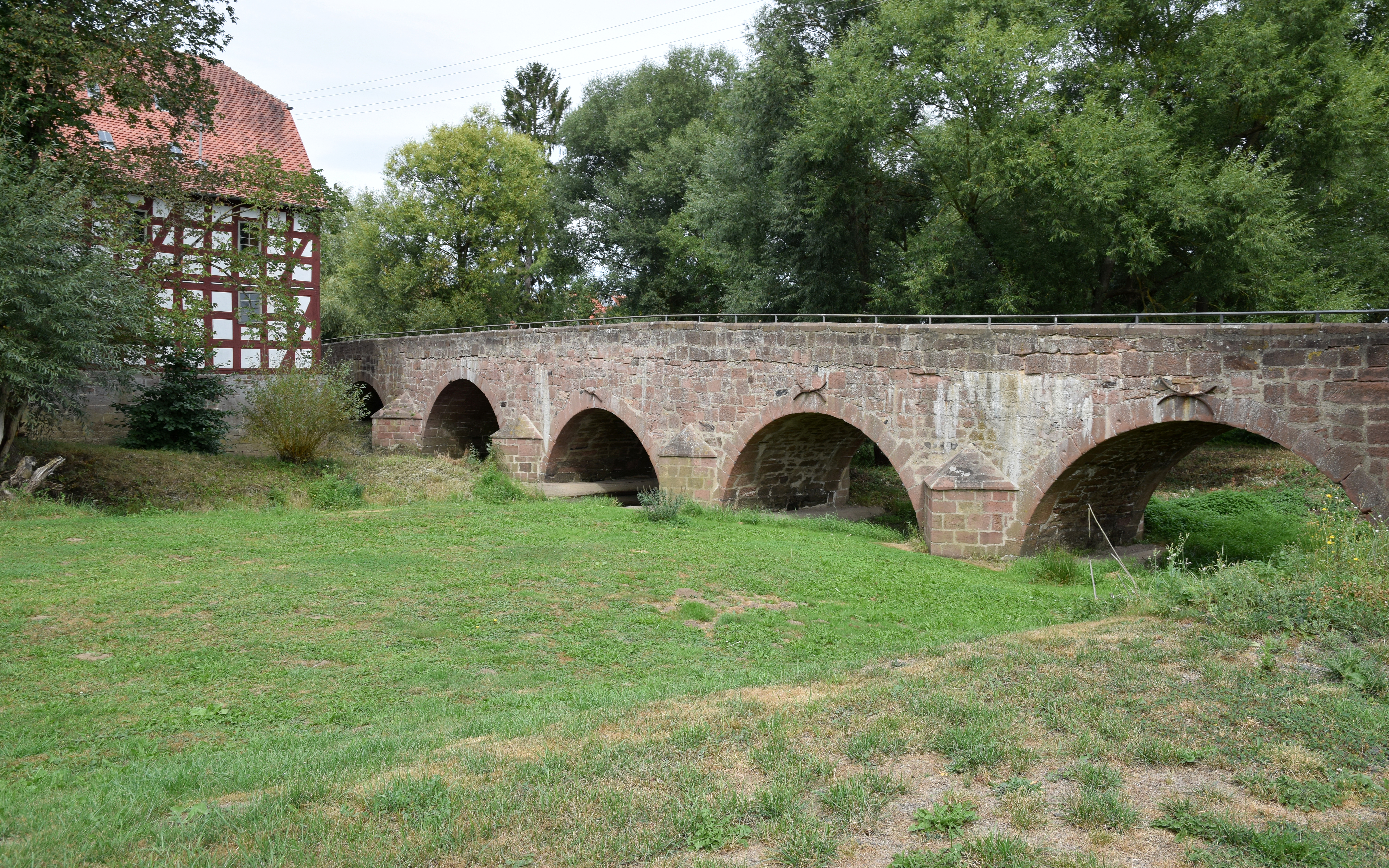 Die Alte Ohmbrücke (Amöneburg), umkämpft bei der Schlacht an der Brücker Mühle 1762